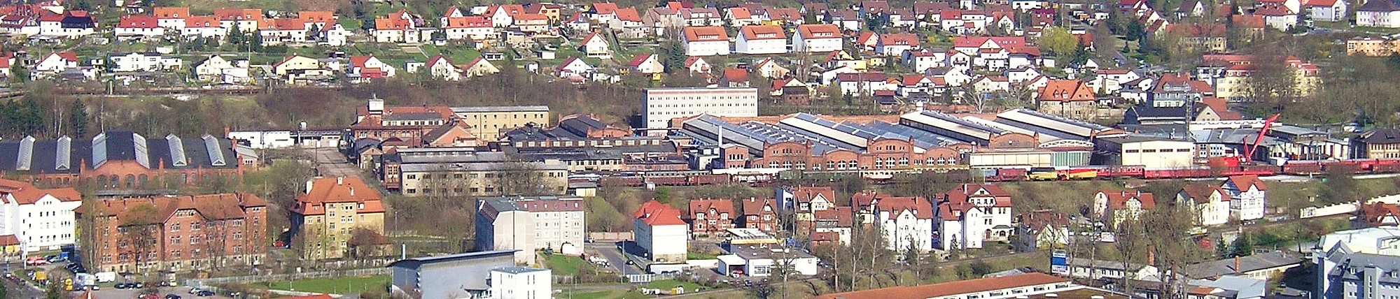 Blick auf das Dampflokwerk Meiningen (Bildmitte), links die Tenderhalle, Mitte/links die Werkstätten, Mitte/rechts die Kesselschmiede und Lokhalle, Mitte/hinten das Verwaltungsgebäude, rechts das Anheizhaus mit Drehscheibe, ganz rechts z.T. die Berufsschule